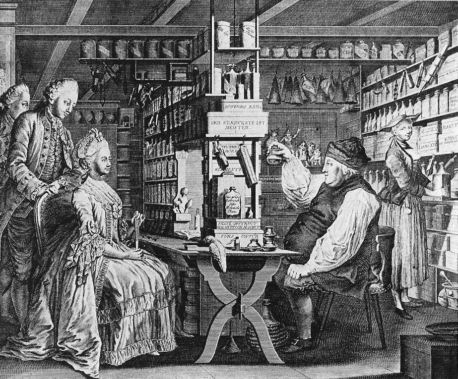 Pharmacie Rustique. Französische Patienten des höchsten Standes in der Apotheke von Michael Schüppach auf dem Dorfberg in Langnau. Nach Natur gezeichnet von Gottfried Locher (1774), graviert von Bartholomäus Hübner (1775), 43,2 x 28 cm, erhältlich in Basel bei Chrétien de Mechel und in Paris bei Basan et Poignant. Originale in Hist. Museum Bern, Heimatmuseum Langnau, Bildersammlung der Schweiz. Landesbibliothek Bern, Graphische Sammlung der ETH Zürich, Kupferstichkabinett des Kunstmuseums Basel.